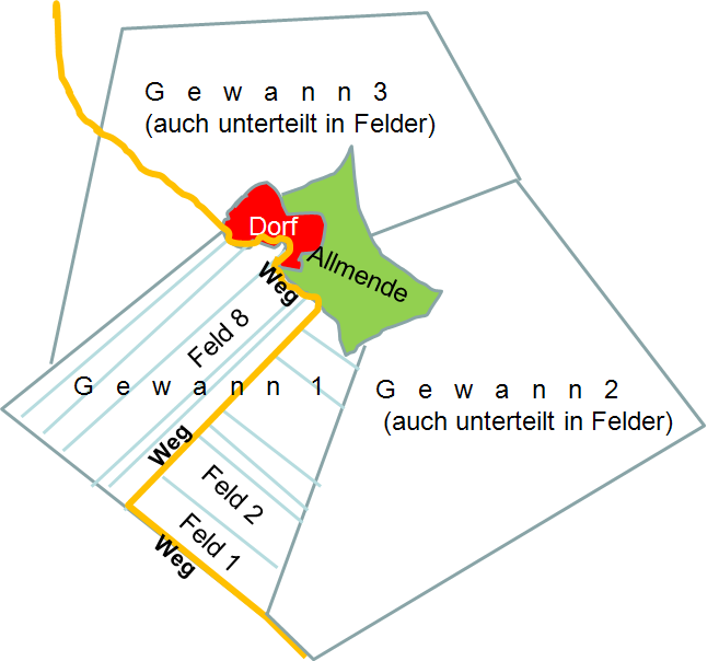 Skizze von Gewannen um ein Dorf